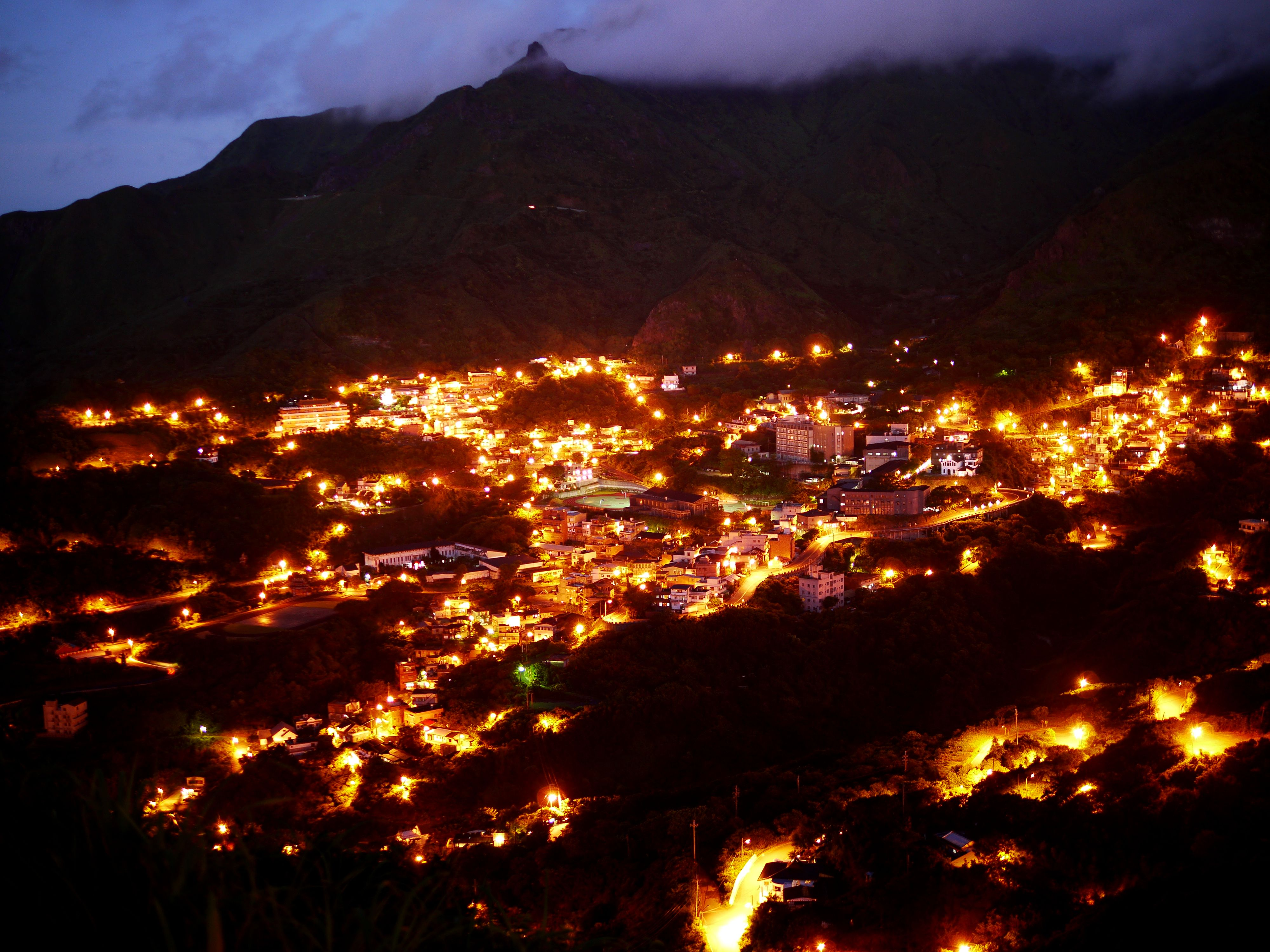 基隆山遠眺金瓜石夜景